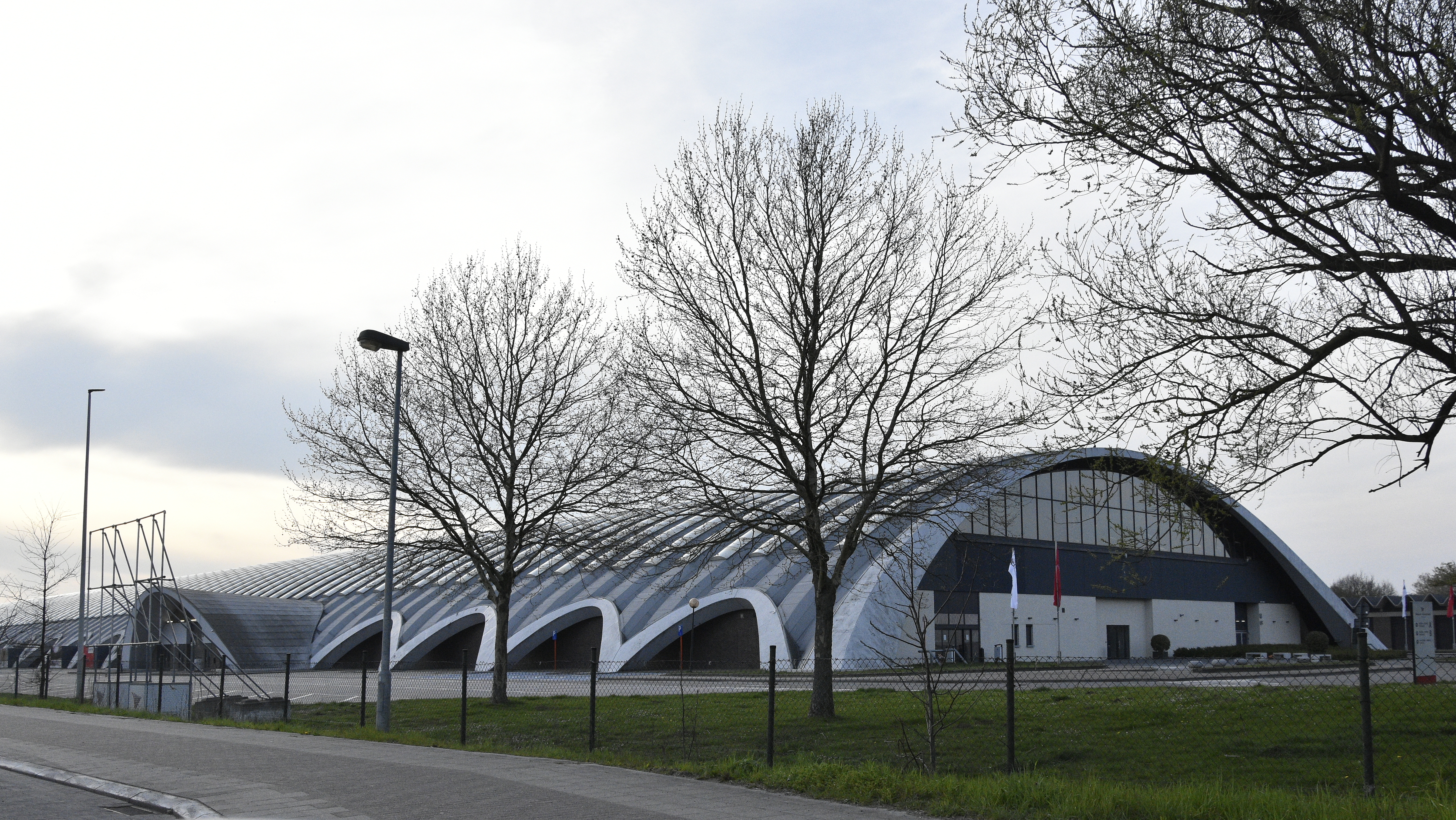 Nekkerhal - Mechelen 6-04-2019 17-41-41